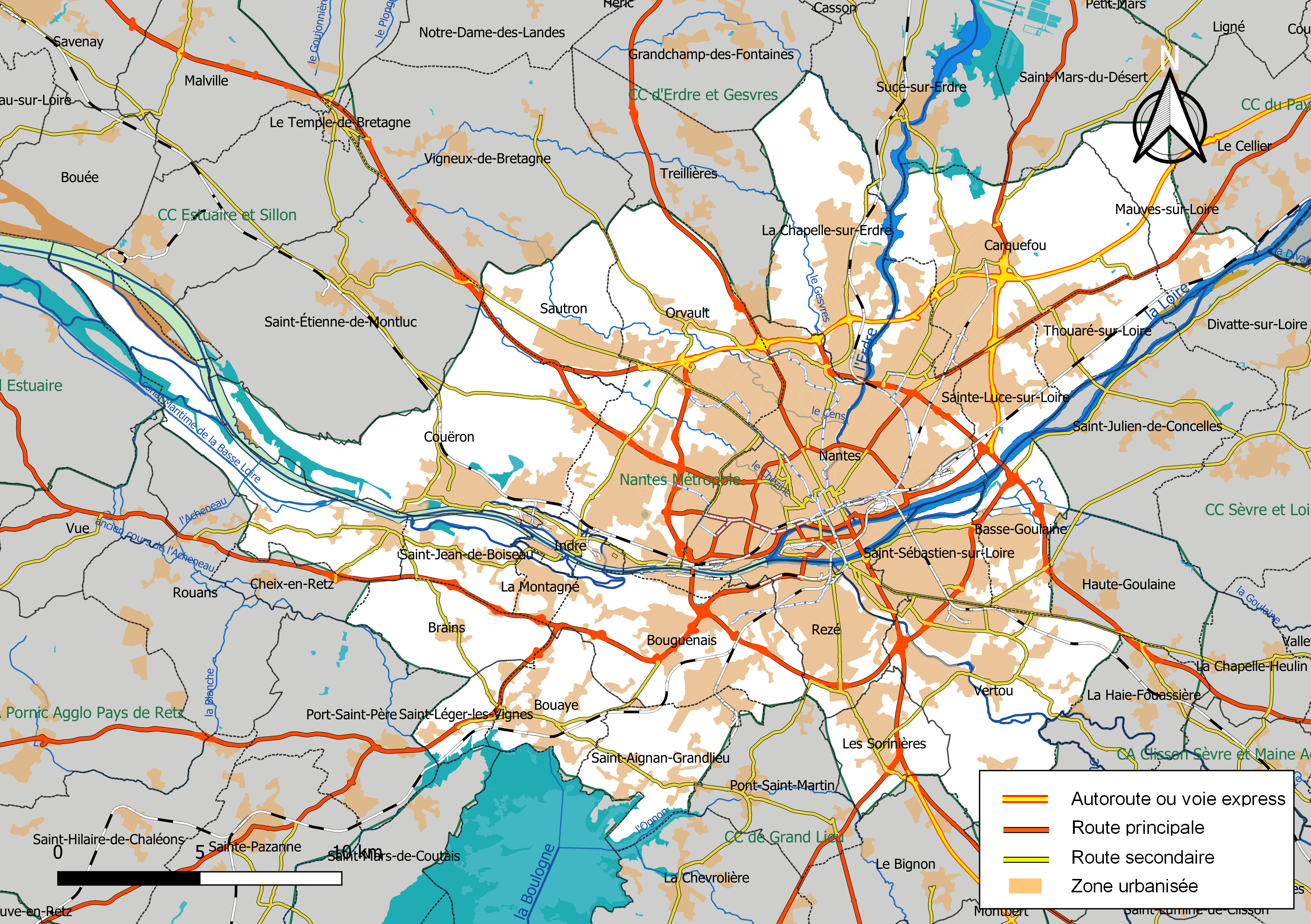 Carte géographique de l'intercommunalité Nantes Métropole, département de la Loire-Atlantique, France. Composition au 1er janvier 2019.